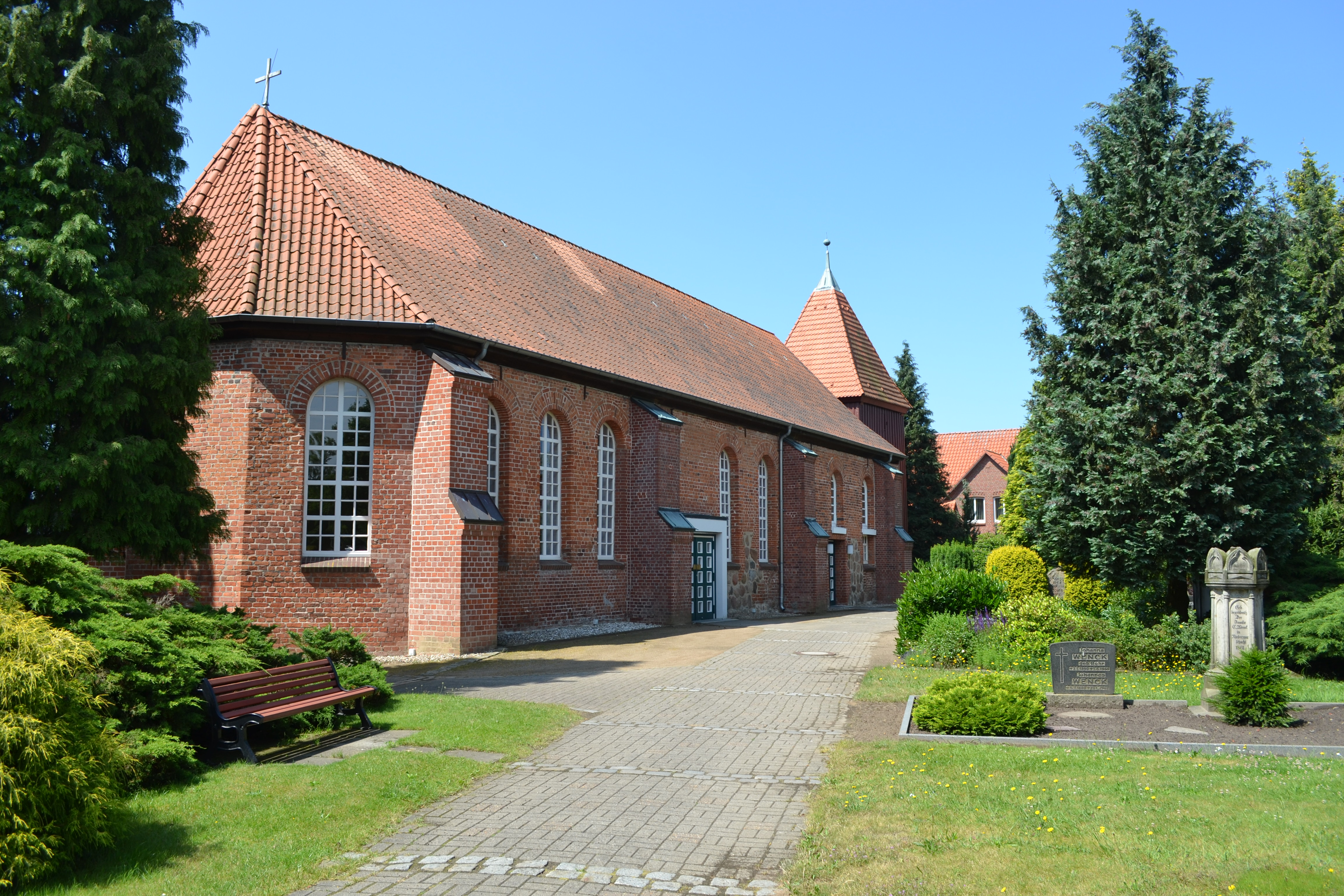 Petrikirche mit Glockenturm Am Friedhof 2